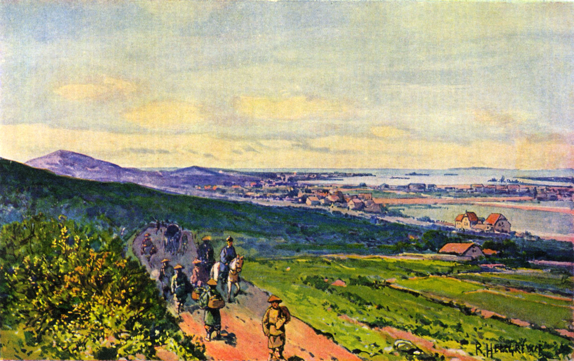 Tsing-tau mit der Bucht von Kiau-tschou.